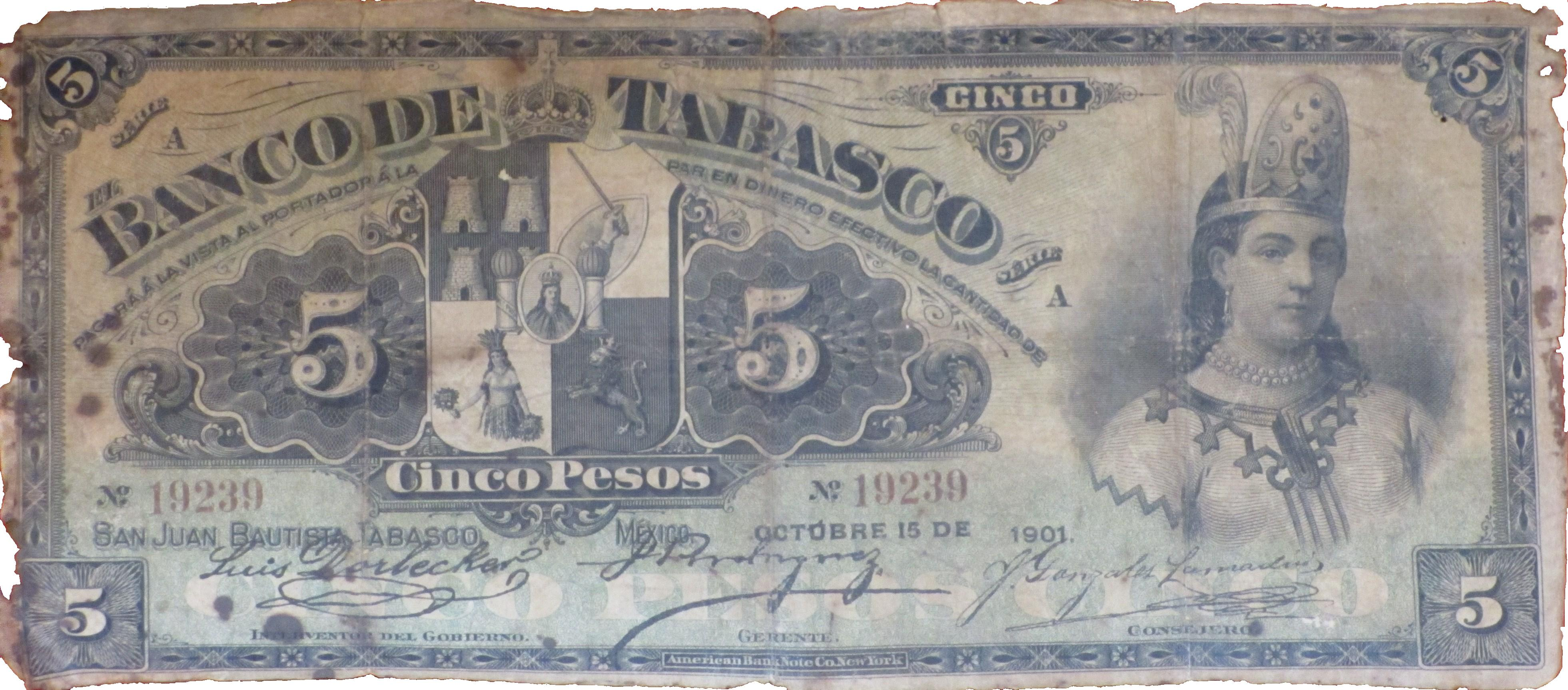 Billete de 5 pesos emitido por el Banco de Tabasco en 1901. Se puede observar que lleva al centro el escudo del estado de Tabasco y la imagen de Malitzin conocida también como la "Malinche".